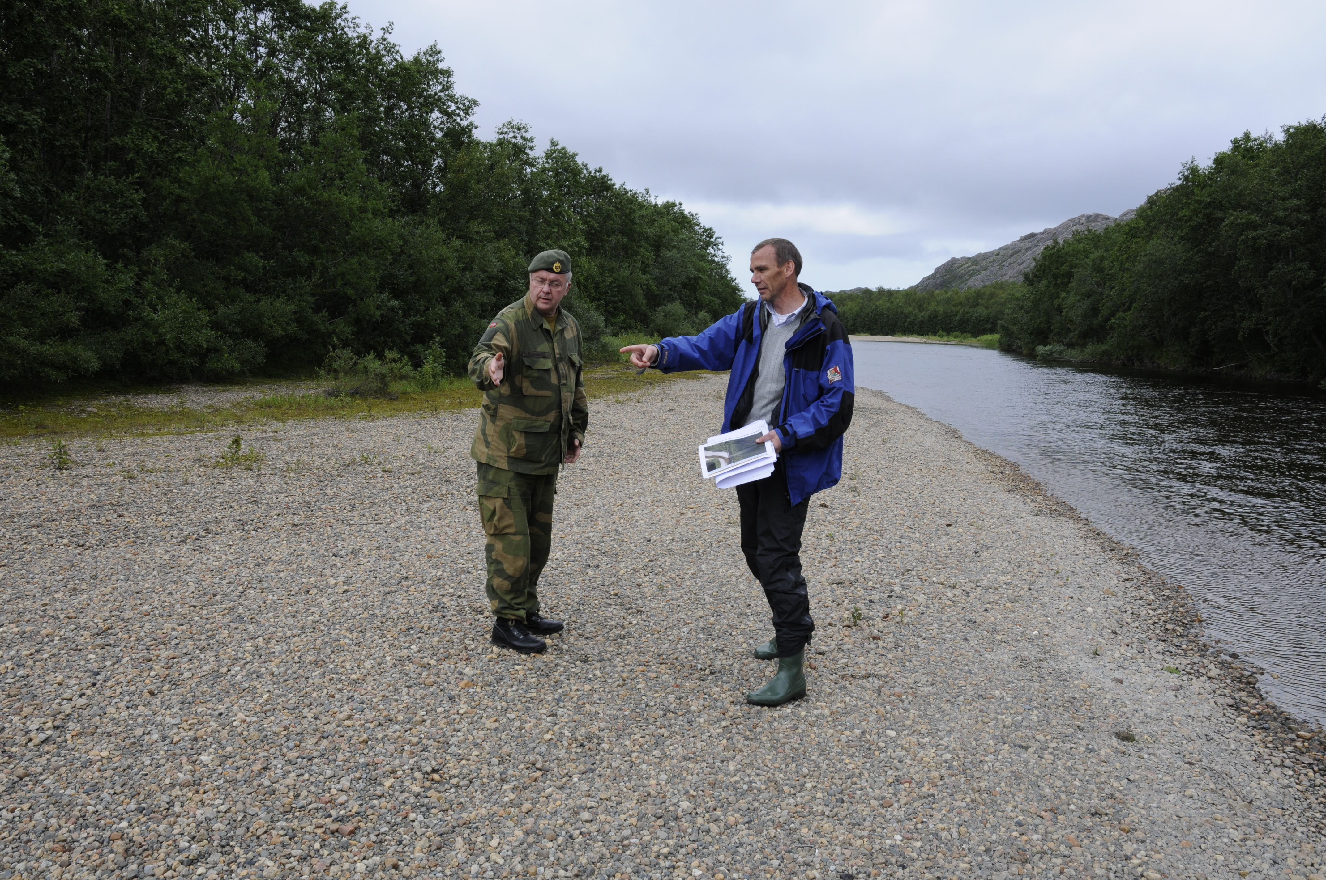 Norsk-russisk grenseoppgang 2012: Direktør Nils Karbø i landdivisjonen i Kartverket (t.h.) og grensekommissær Ivar Magne Sakserud ved Grense Jakobselv. Området de står på har antagelig vært russisk område tidligere, men så har "djupålen" og dermed grensen flyttet seg slik at de nå er på norsk side. Foto: Sveinung Engeland, Kartverket